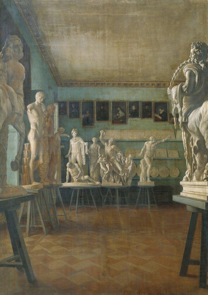 Хилкова Екатерина Николаевна. «Внутренний вид класса Петербургской рисовальной школы в помещении таможенного здания». Холст, масло. 143 x 101 см. Государственный Русский музей, С.-Петербург.